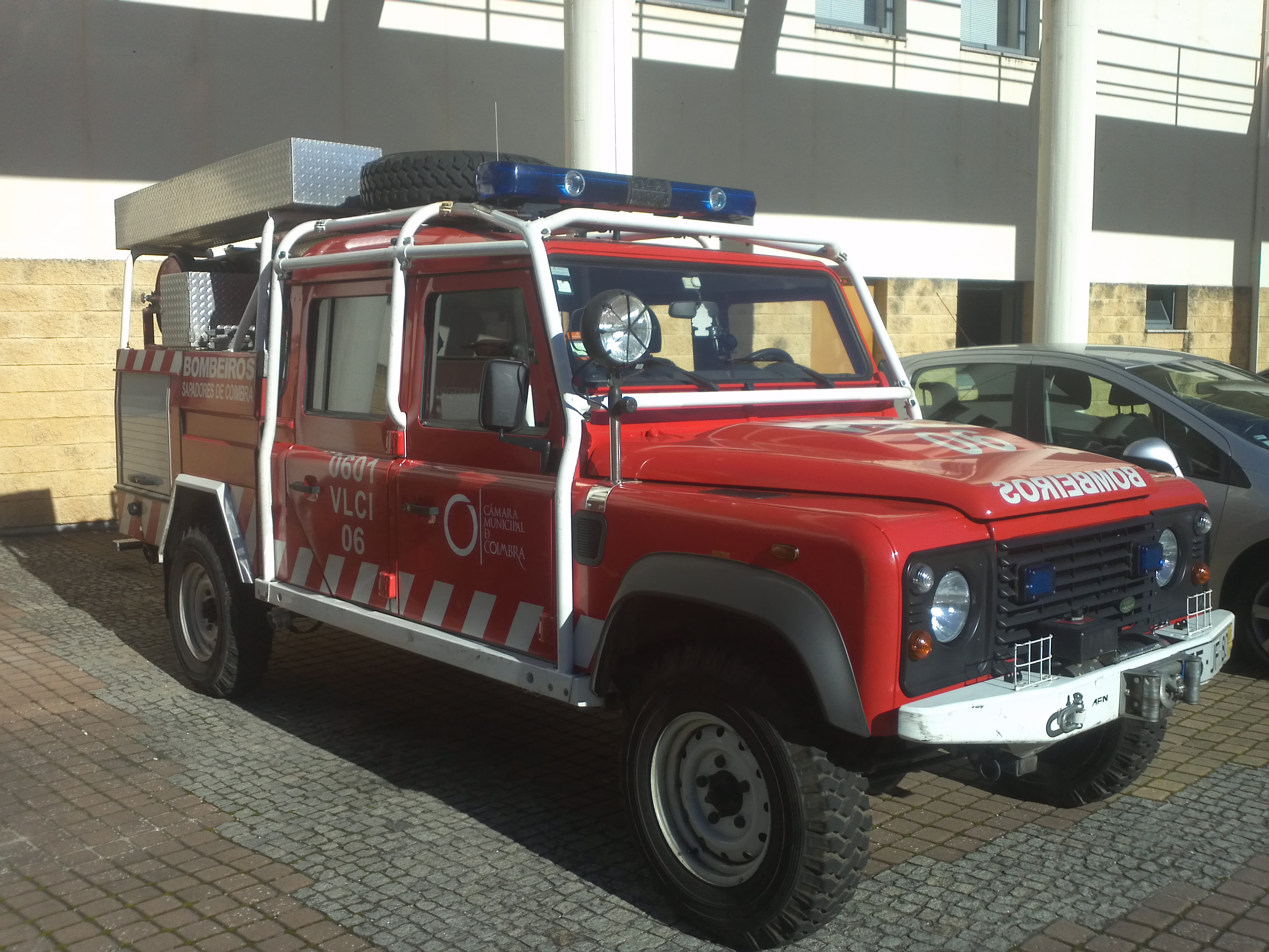 Veiculo Ligeiro de Combate a Incêndios 06